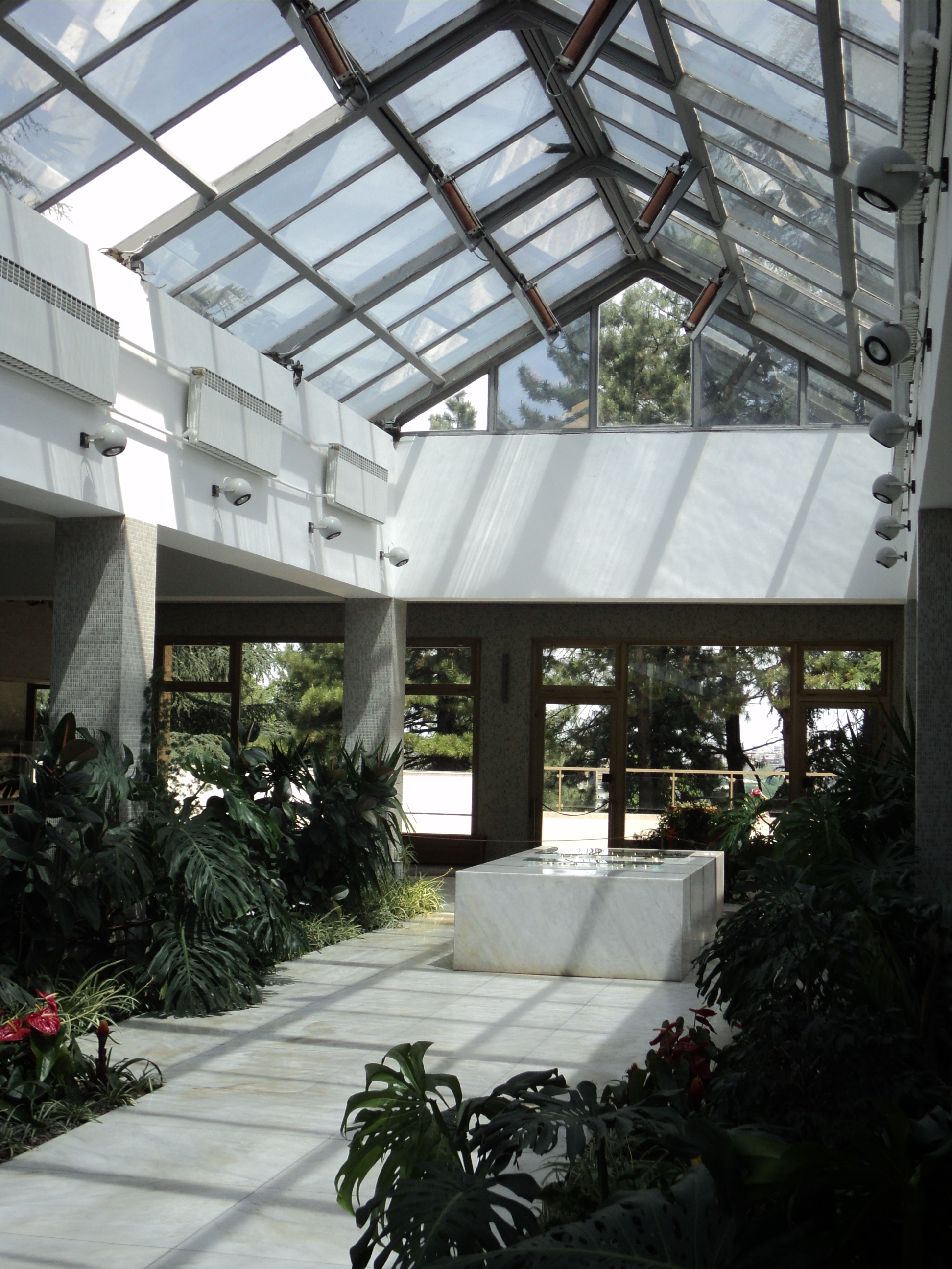 Unutrašnjost Kuće cveća